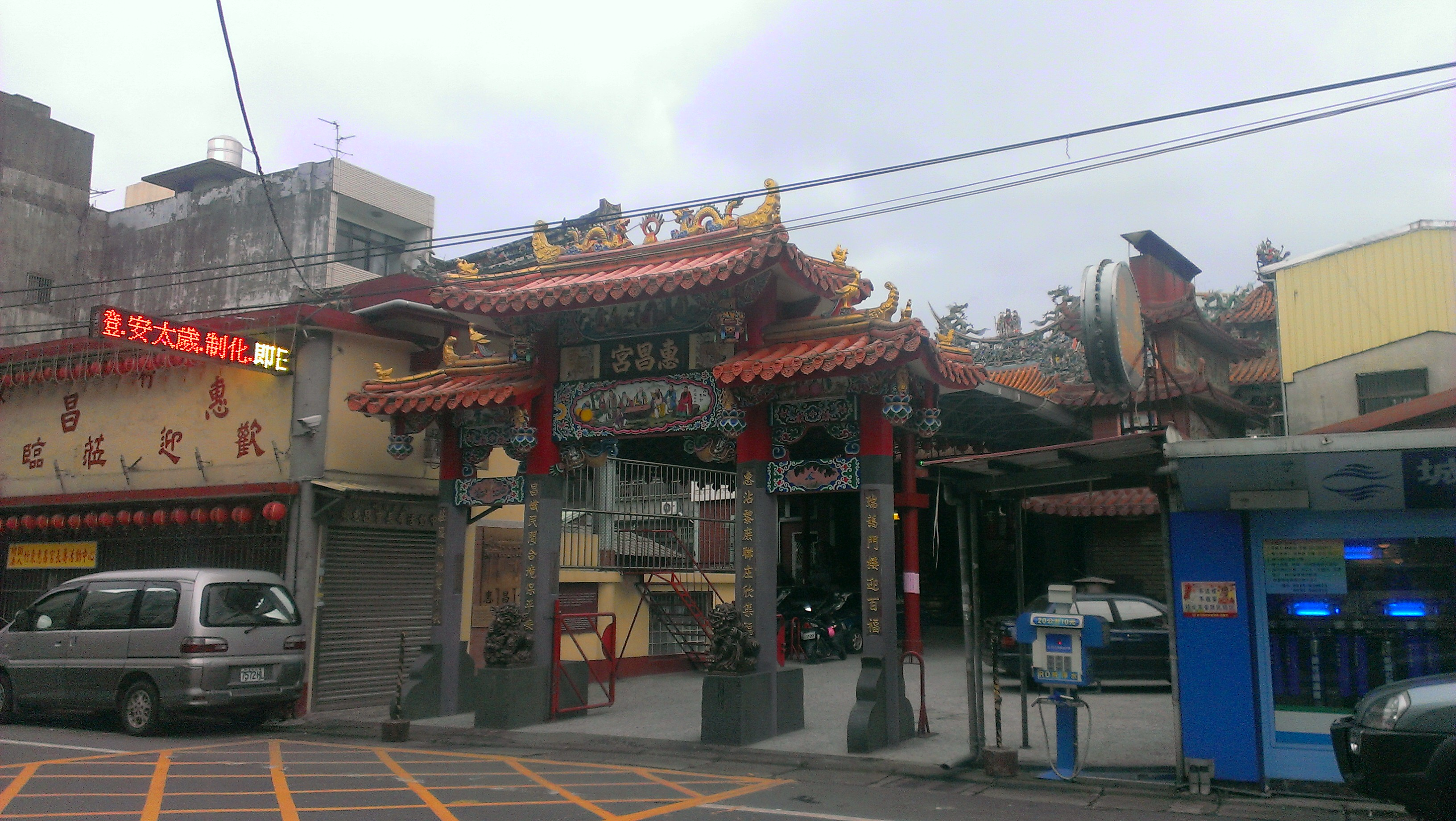 新竹縣竹東鎮惠昌宮門口